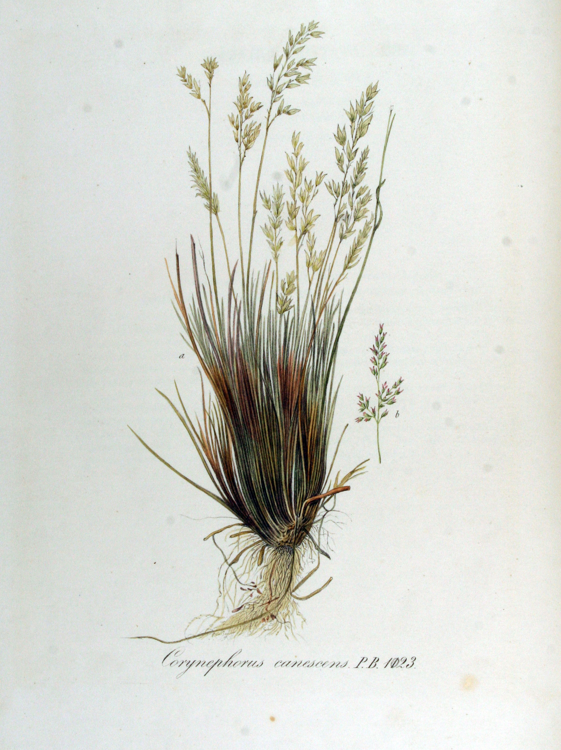 Corynephorus canescens (L.) Beauv.